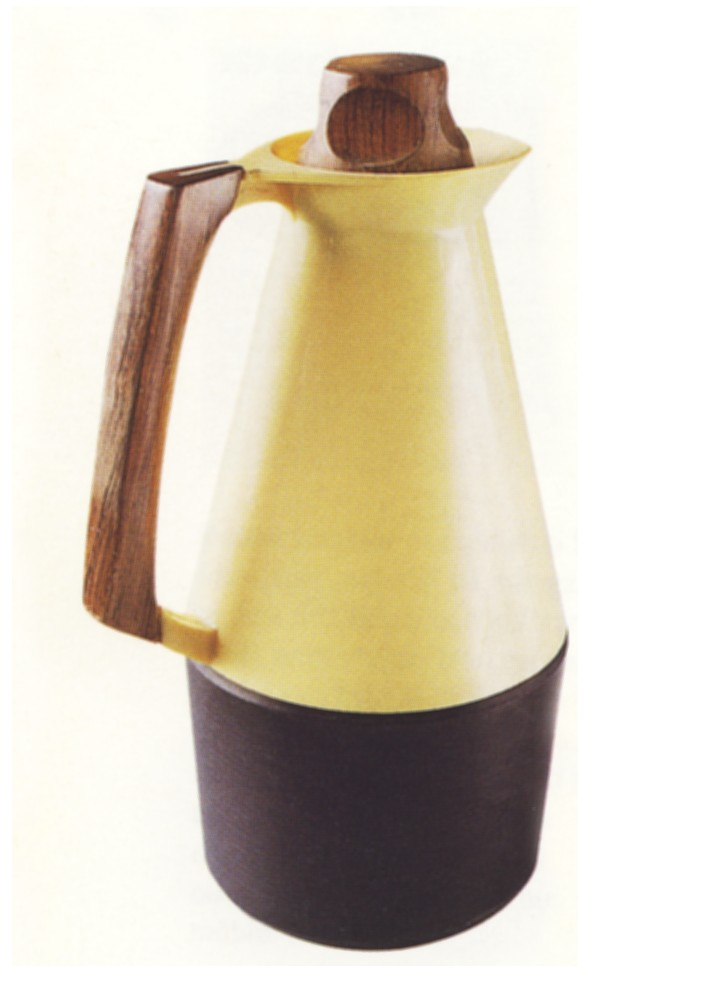 Car Arne Bregers Termoskanna "Signatur" en "TV-kanna" från 1962